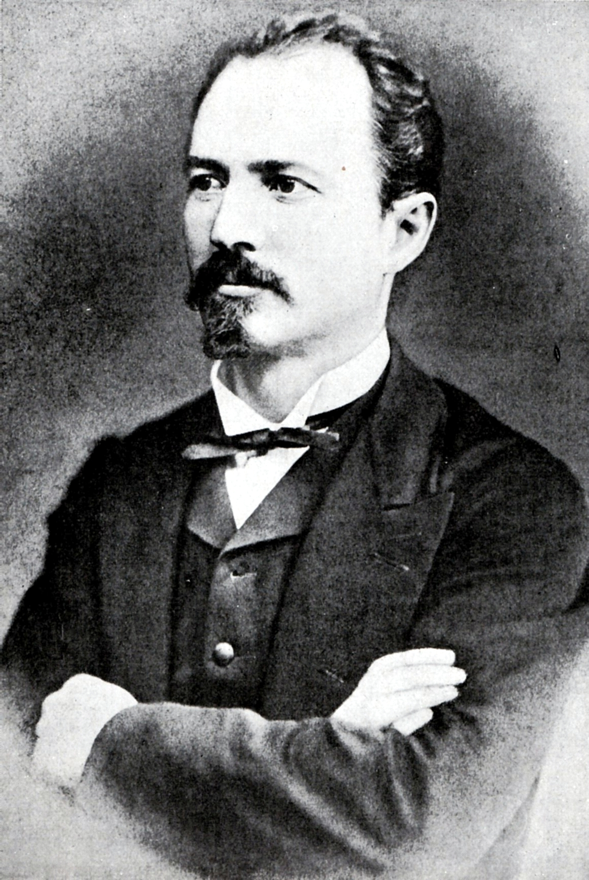 Nicolae Grigorescu (1838 — 1907), Romanian painter